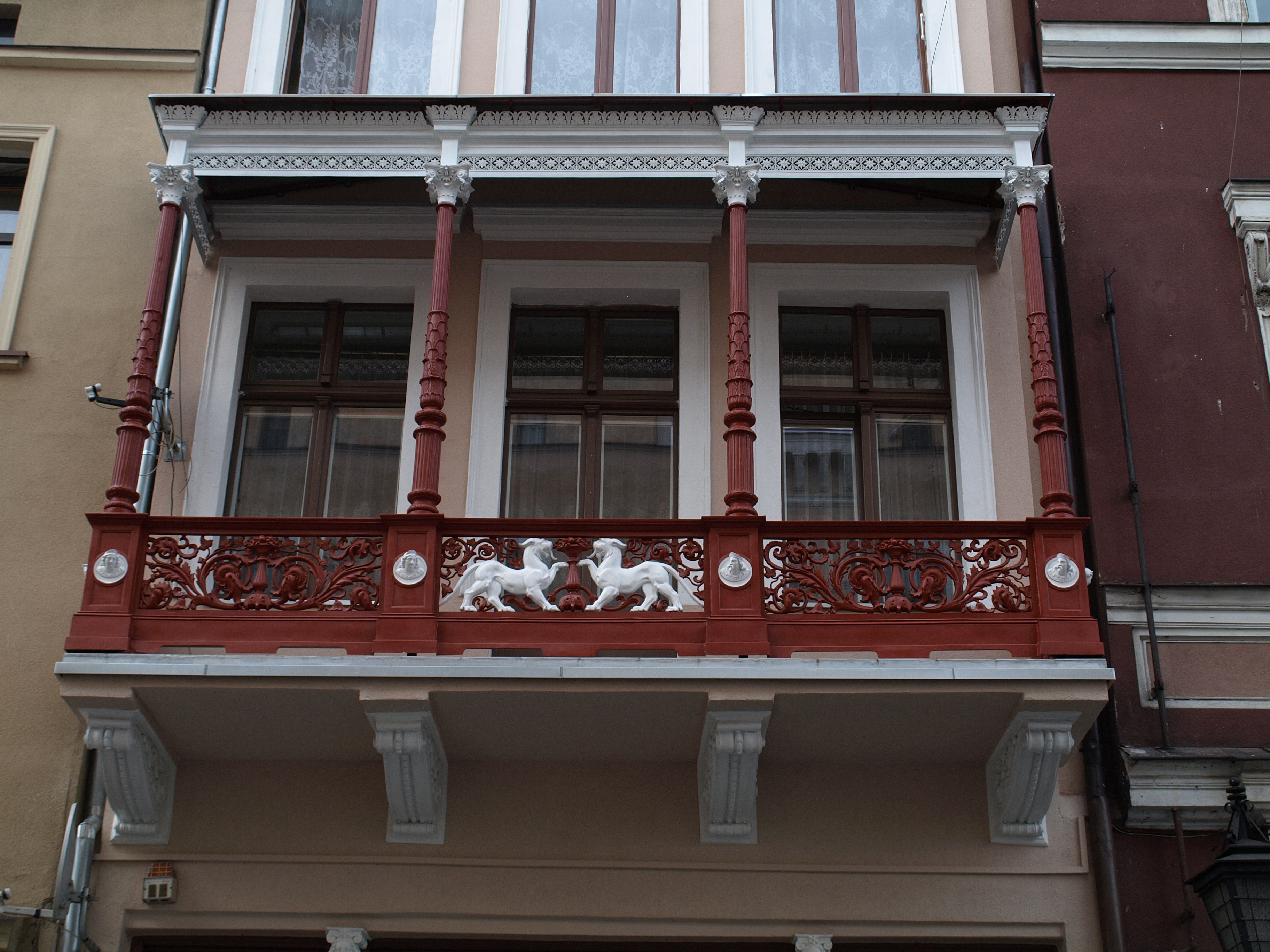 Balkon budynku przy ul. Pańskiej w Grudziądzu